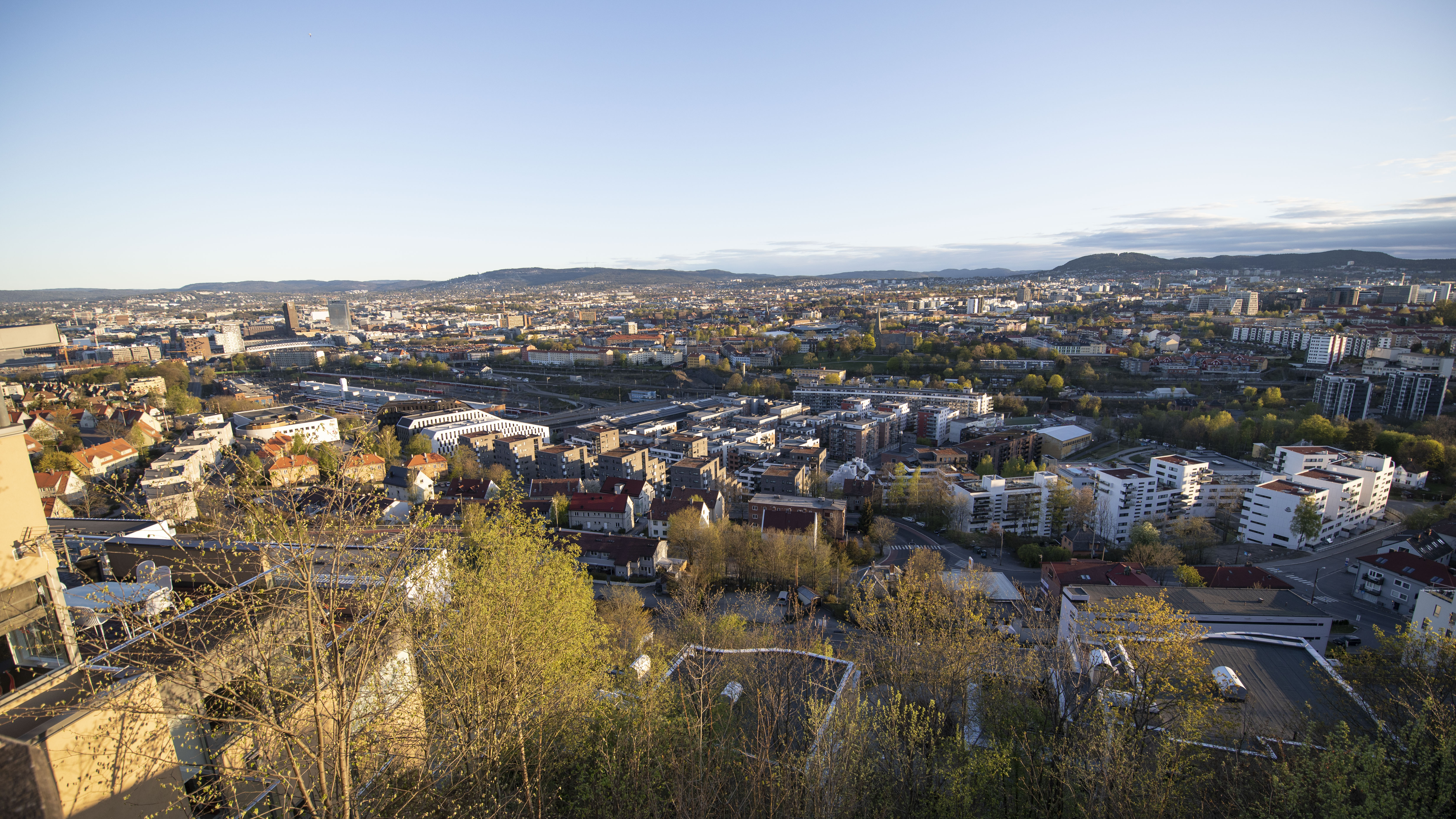 Bydel Gamle Oslo sett fra Ekeberg